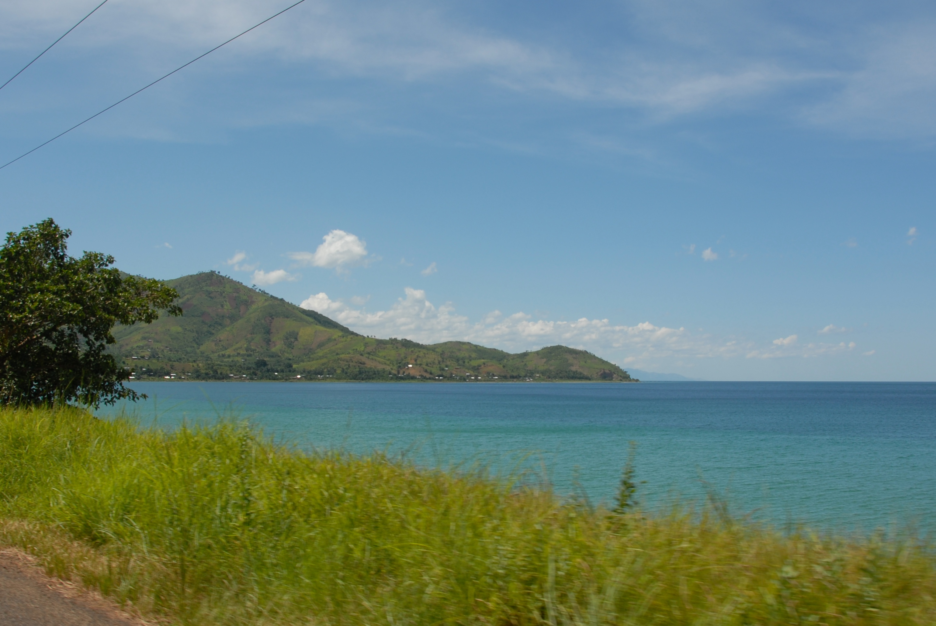 Lake Tanganyika